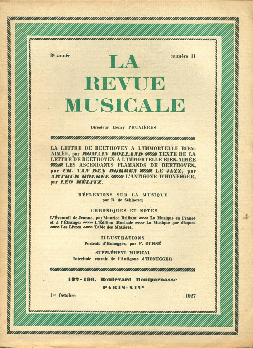 Couverture du n°11 de La Revue musicale (1927)